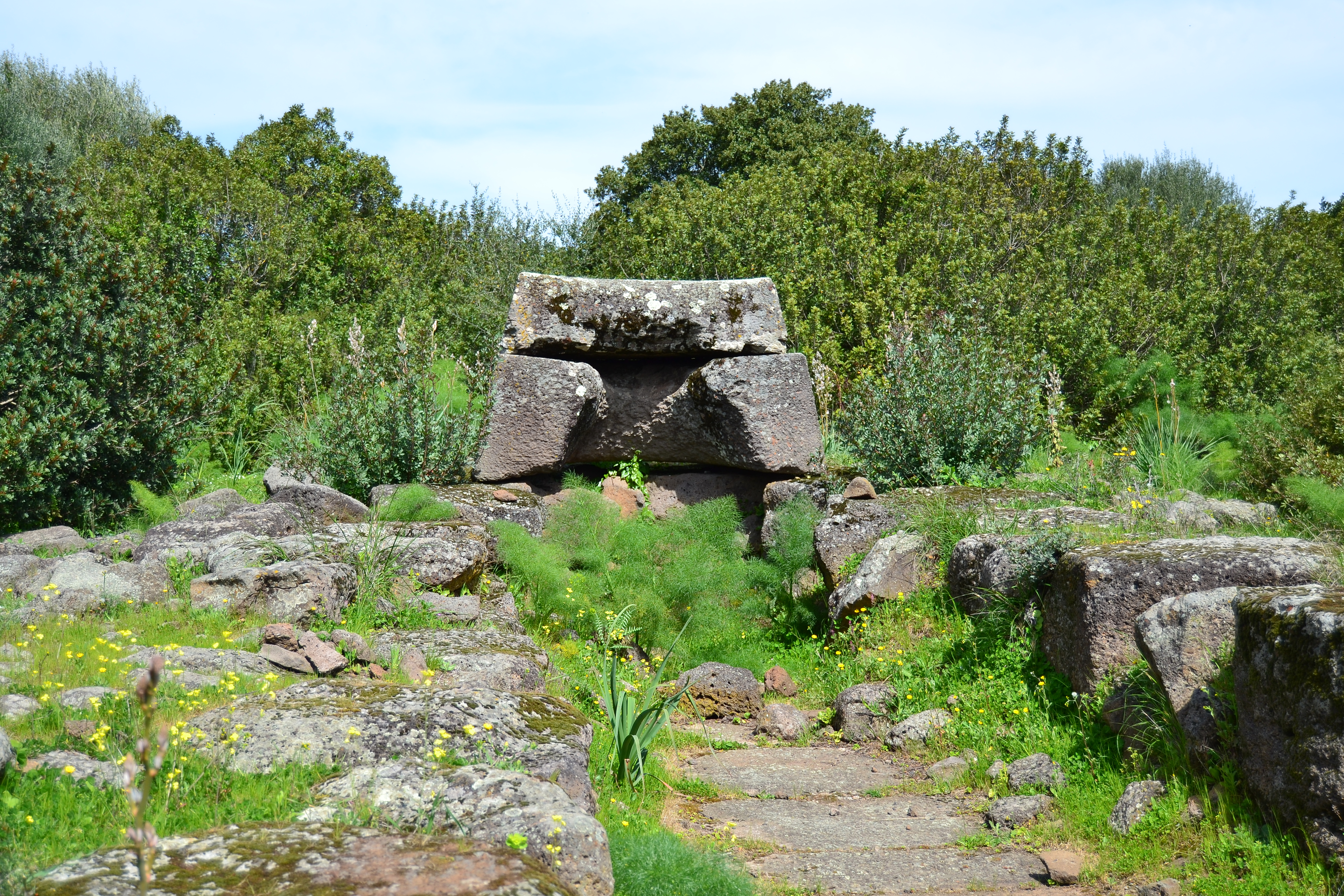 Nuraghe e tomba di gigante n.2 di Iloi - MIBAC This is a photo of a monument which is part of cultural heritage of Italy.